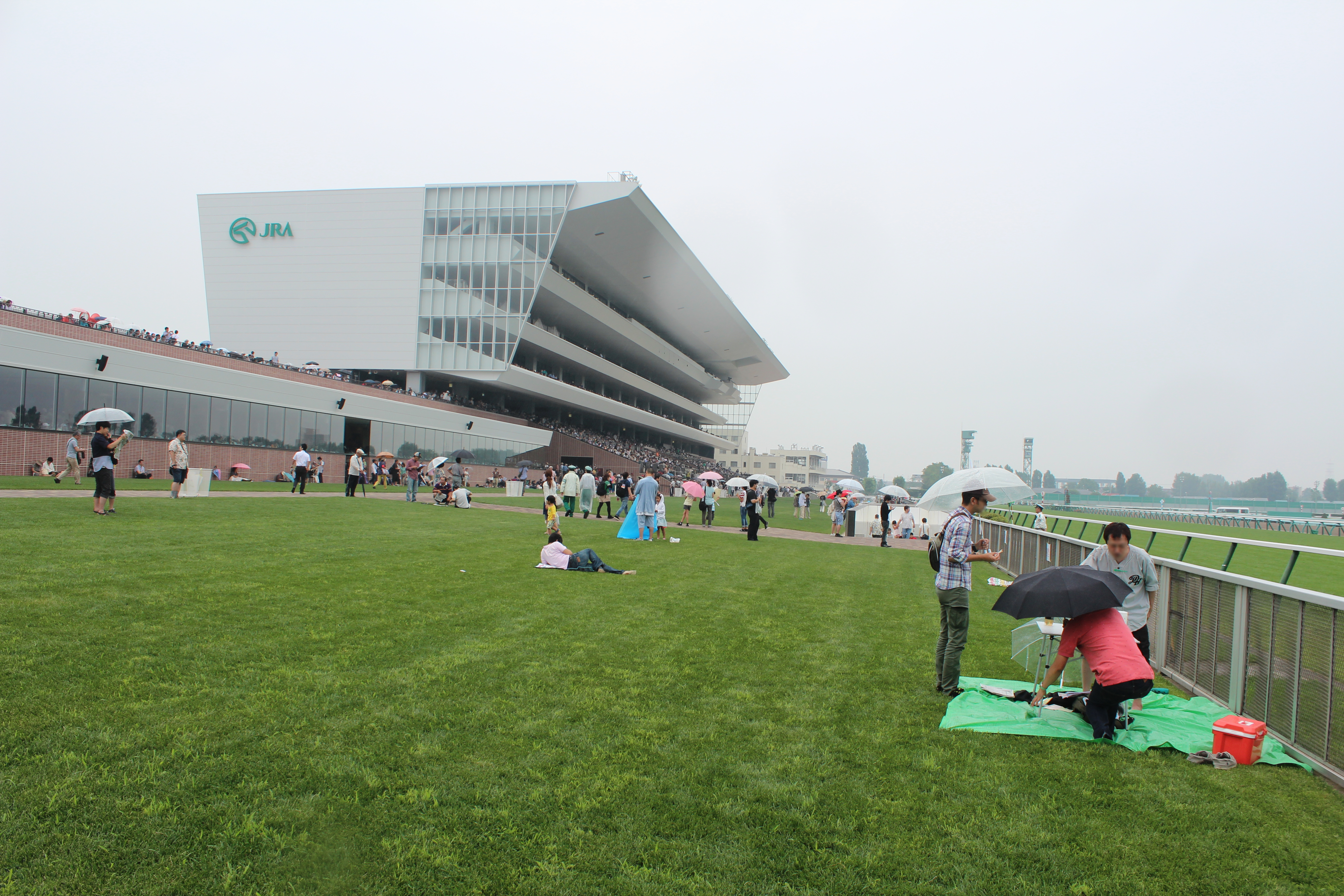 2014年7月26日、新装オープン日の札幌競馬場新スタンド。